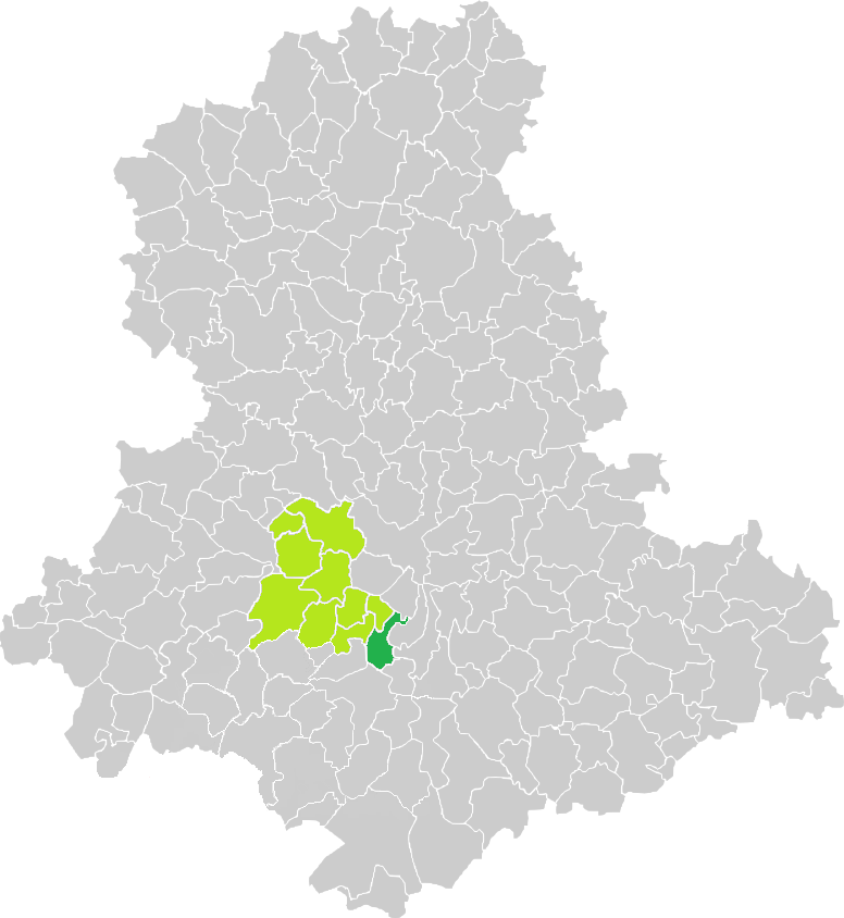 Carte de situation de la commune de Jourgnac (en vert foncé) dans le votre Canton (en vert clair) sur une carte des communes de la Haute-Vienne